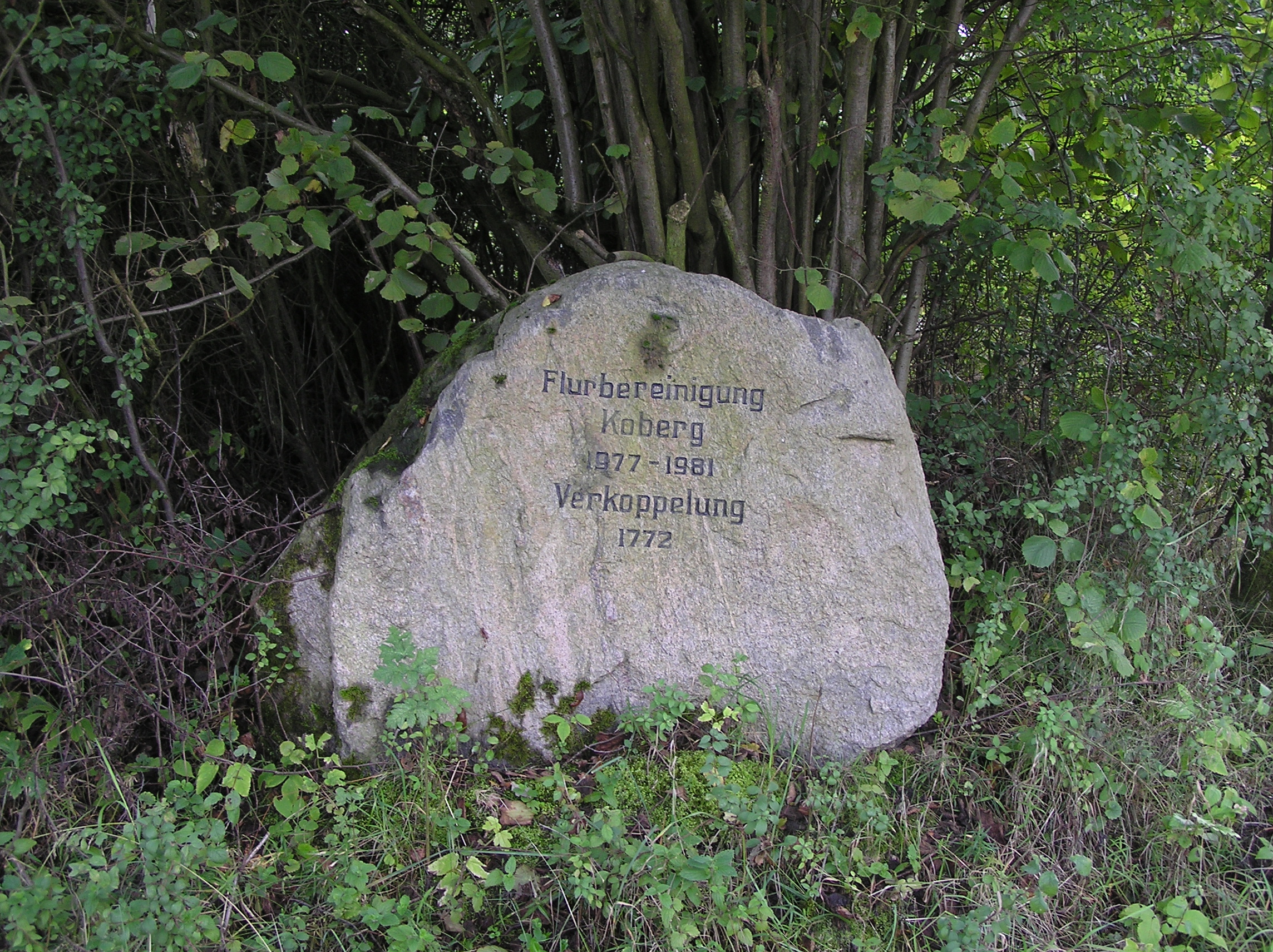 Denkstein